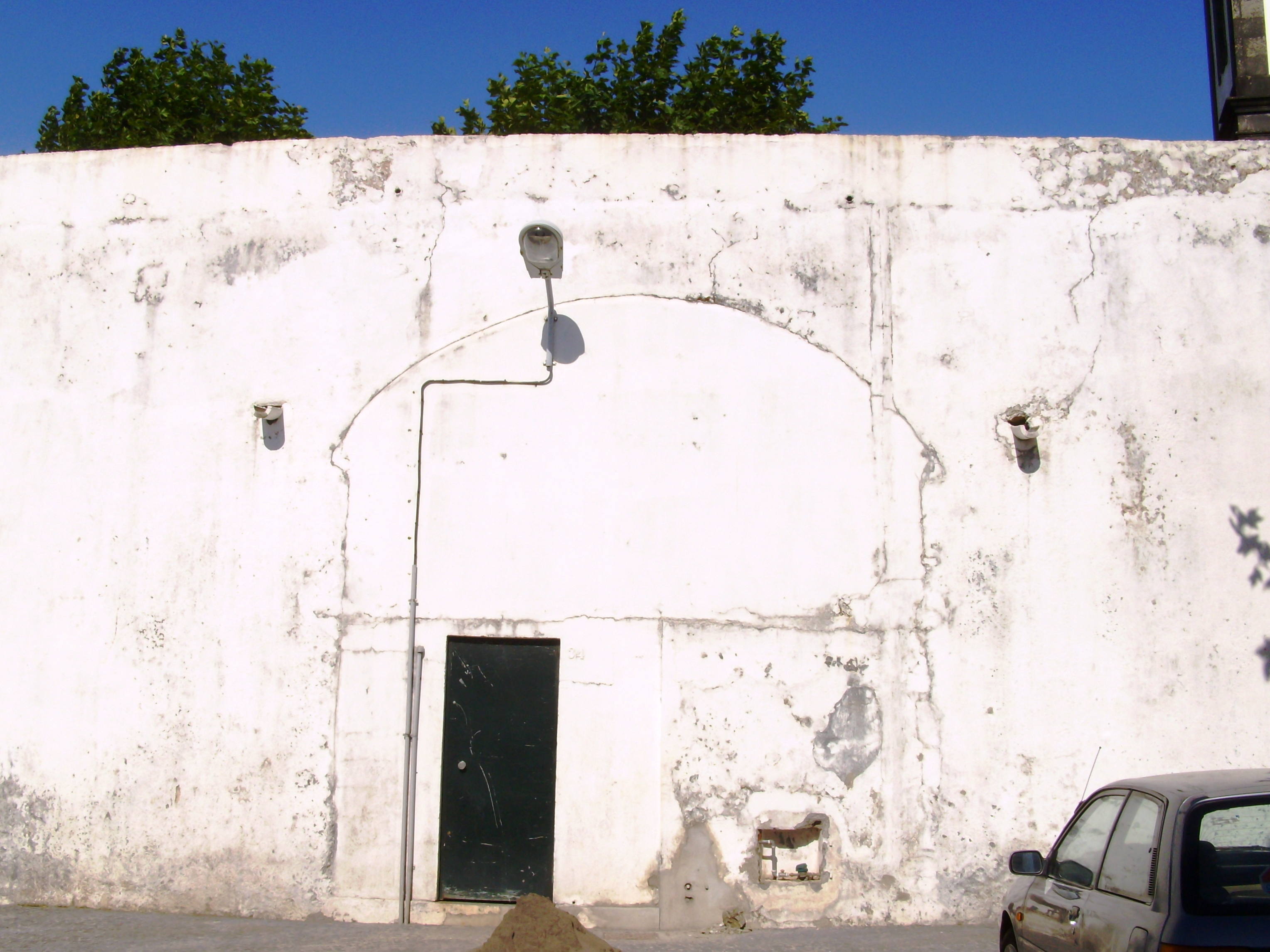 Ermida da Mãe de Deus, freguesia de São Pedro, concelho de Ponta Delgada, ilha de São Miguel, Açores: aspecto da entrada do subterrâneo.